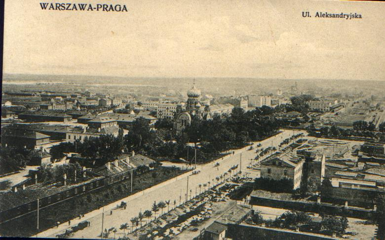 Sobór św. Marii Magdaleny w Warszawie